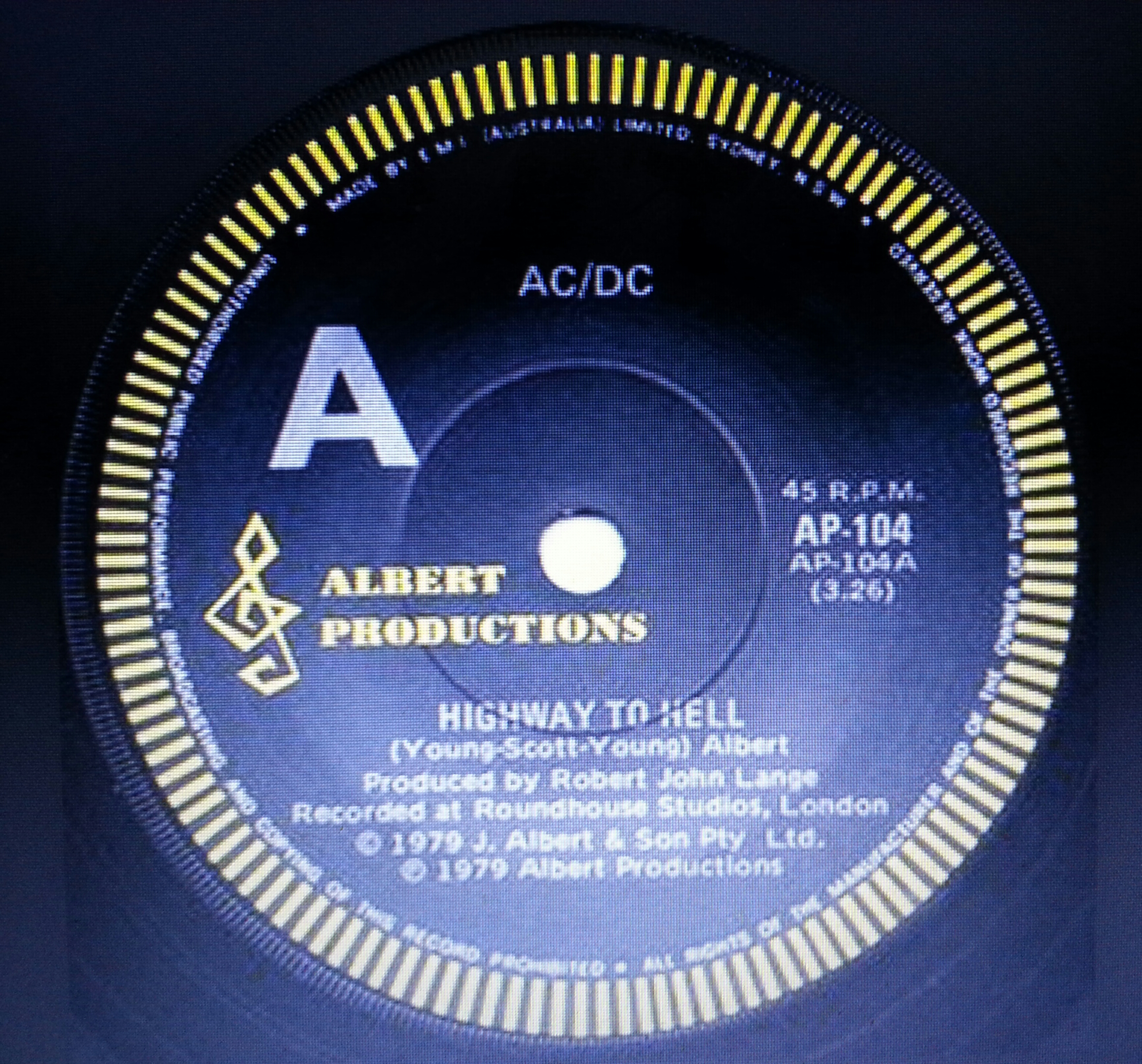 Original vinyl single 1979